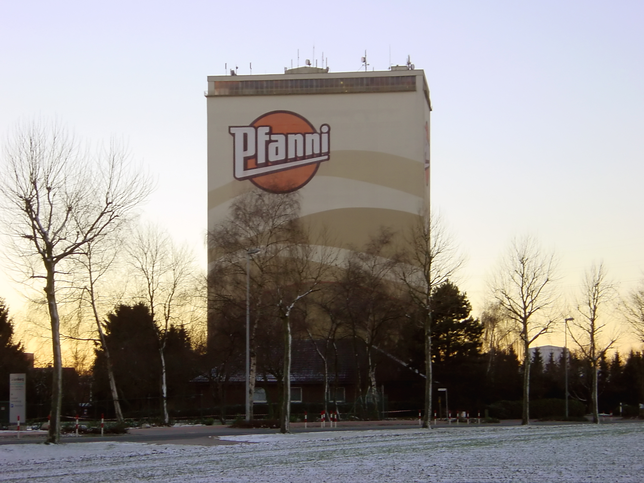 Der "Pfanni-Turm" im niedersächsischen Cloppenburg, Deutschland, gilt als eines der Wahrzeichen der Stadt. Der 76 Meter Turm wurde 1963 von der Spreda Nahrungsmittelwerke AG als "Spreda-Sprühturm" für ein Kalt-Trocknungsverfahren zur Pulverisierung von Lebensmitteln errichtet. Bis etwa 2004 befand sich auf dem ehemaligen Werksgelände der Spreda AG ein Werk des deutschen Lebensmittelunternehmens Pfanni GmbH & Co. OHG.